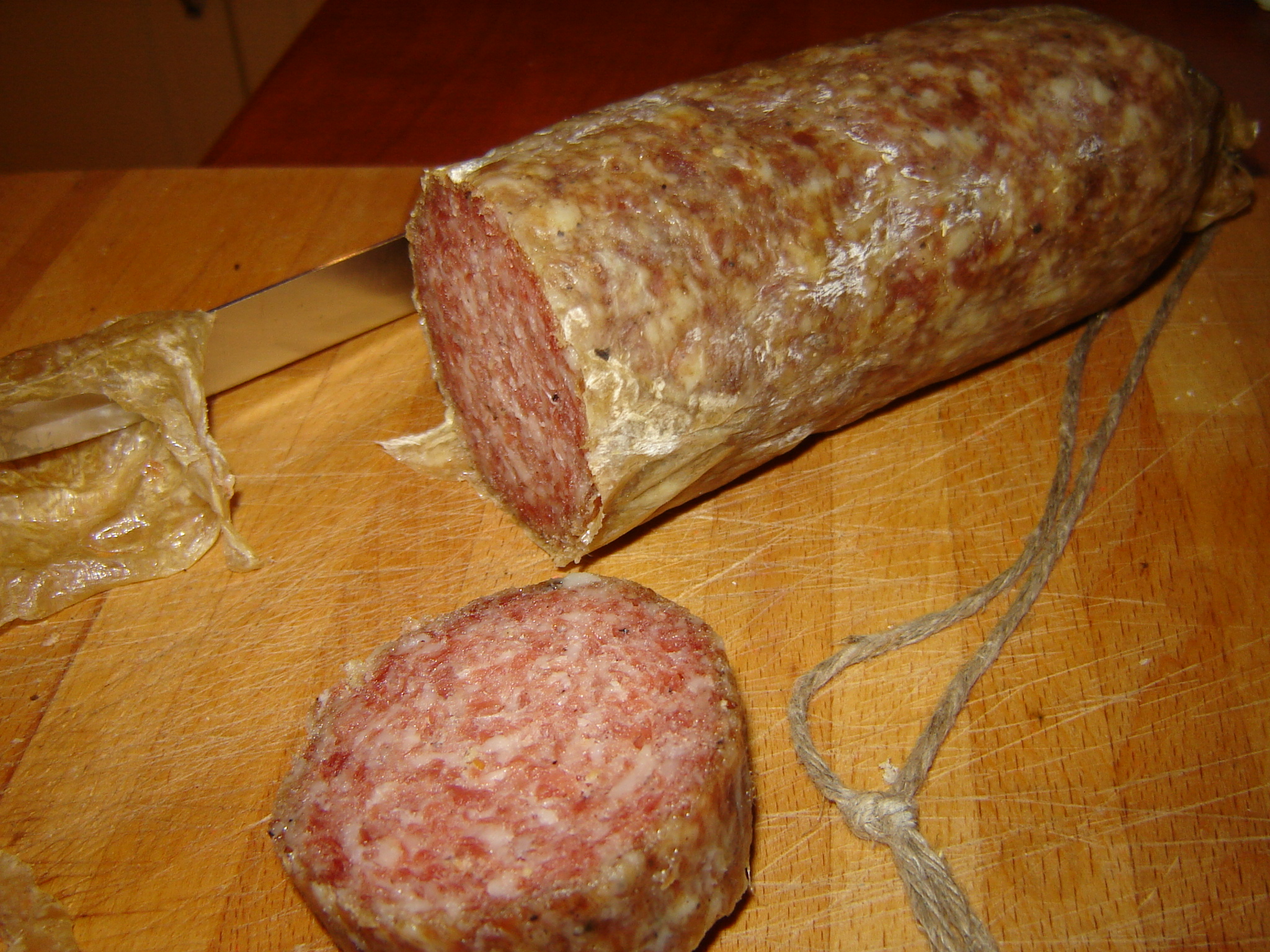 Feldgieker, hier als Eichsfelder Stracke